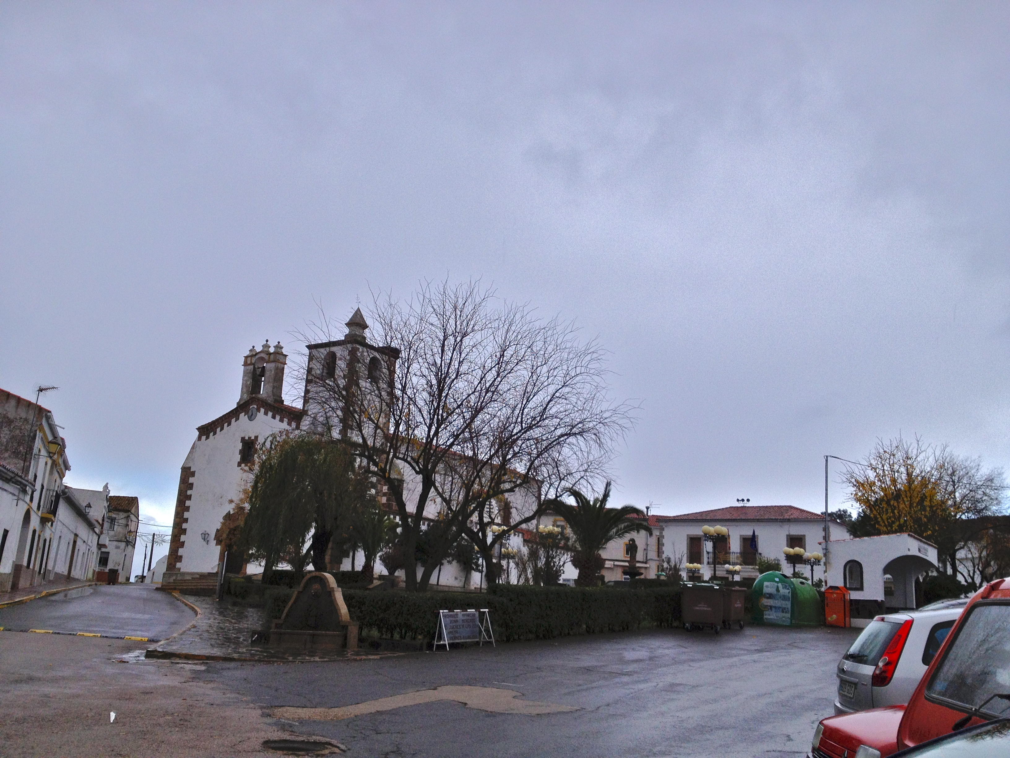 Santiago de Alcántara, provincia de Cáceres, España